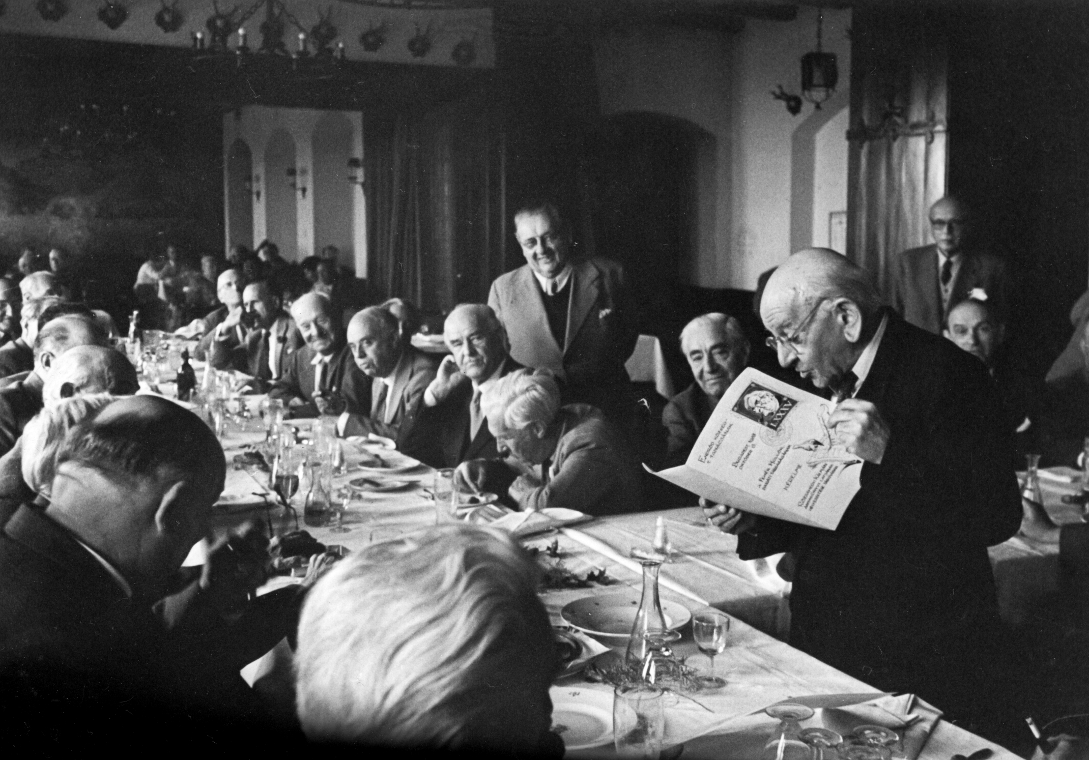 Fészek Klub (Kertész utzca 36). A felvétel a Fehér Hollók Baráti Társaság ünnepi összejövetelén, Rózsahegyi Kálmán 85. születésnapján (Oktober 6?) készült. Location: Hungary, Budapest VII. Tags: interior, restaurant, hospitality, place, companionship, wine-tasting glass, decanter, glass, trophy, chandelier, Budapest Title: Fészek Klub. A felvétel a Fehér Hollók Baráti Társaság ünnepi összejövetelén, Rózsahegyi Kálmán 85. születésnapján készült.